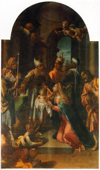 Presentación en el Templo, San Michele in Borgo, Pisa